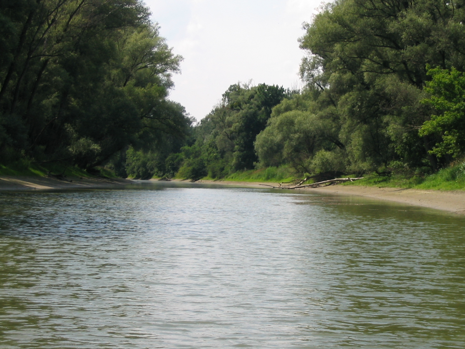 Donauauen